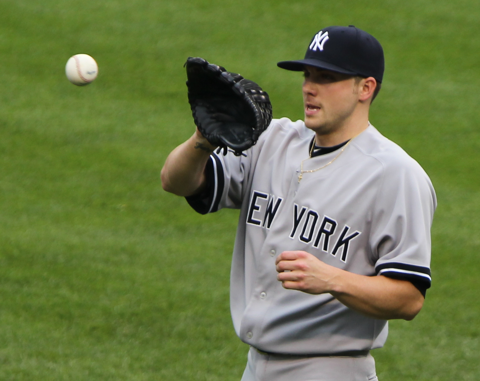 Aaron Laffey